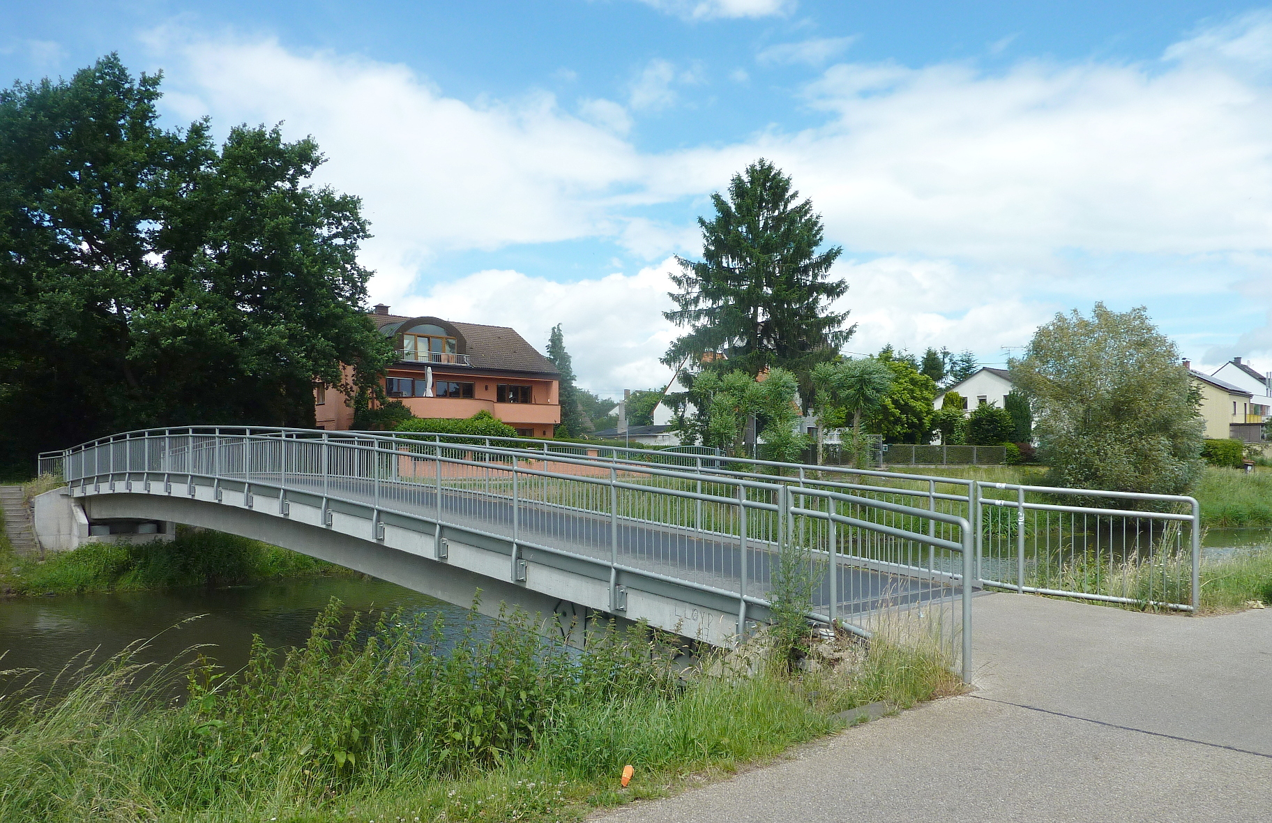 Frankfurt am Main, Stadtteil Sossenheim: Im Mittleren Sand (Straßenname) oder Sossenheim III (amtliche Bezeichnung) ist eine Wohnsiedlung am südwestlichen Rand der Gemarkung, im Süden des Sossenheimer Unterfelds. Die Siedlung stößt im Westen an den Unterlauf des Sulzbachs, der dort die Grenze zum Nachbarstadtteil Frankfurt-Höchst markiert, im Süden an das rechte Ufer des Flusses Nidda und im Norden und Osten an landwirtschaftlich genutzte Flächen des Frankfurter Grüngürtels. Im Bild eine Fußgängerbrücke über die Nidda zwischen den Stadtteilen Sossenheim und Nied (Aufnahmestandort), Blick nach Nordosten. Im Hintergrund Wohnhäuser am südlichen Rand der Siedlung.